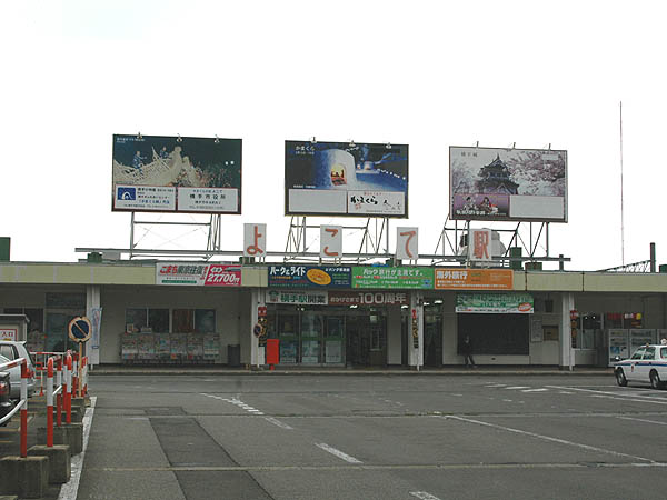 JR横手駅 2005/09/18